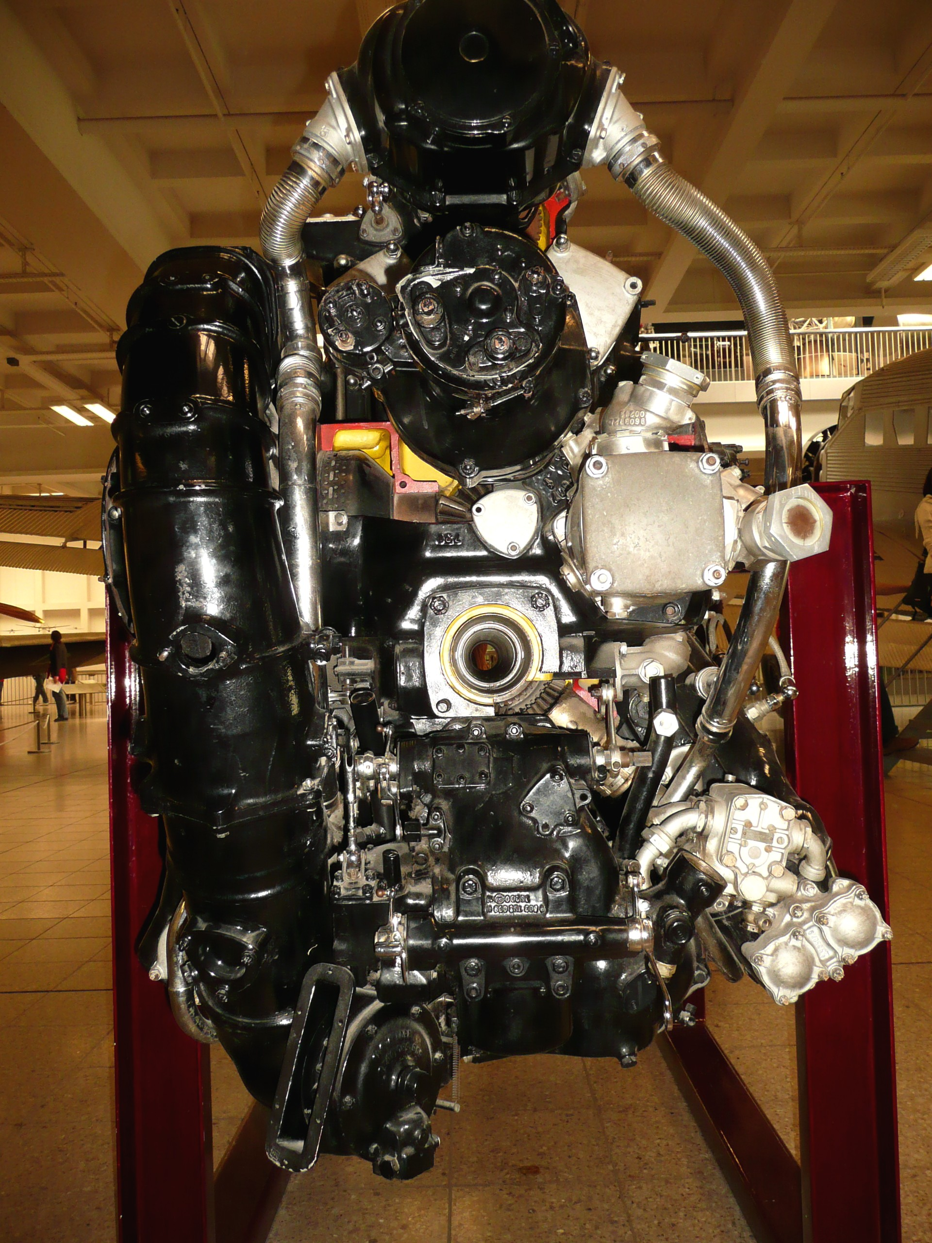 Daimler-Benz DB 603 E Flugzeugmotor Baujahr 1944 von hinten gesehen. Erkennbar die hohle Kurbelwelle durch die eine Bordwaffe feuern konnte. Ausgestellt im deutschen Museum München.